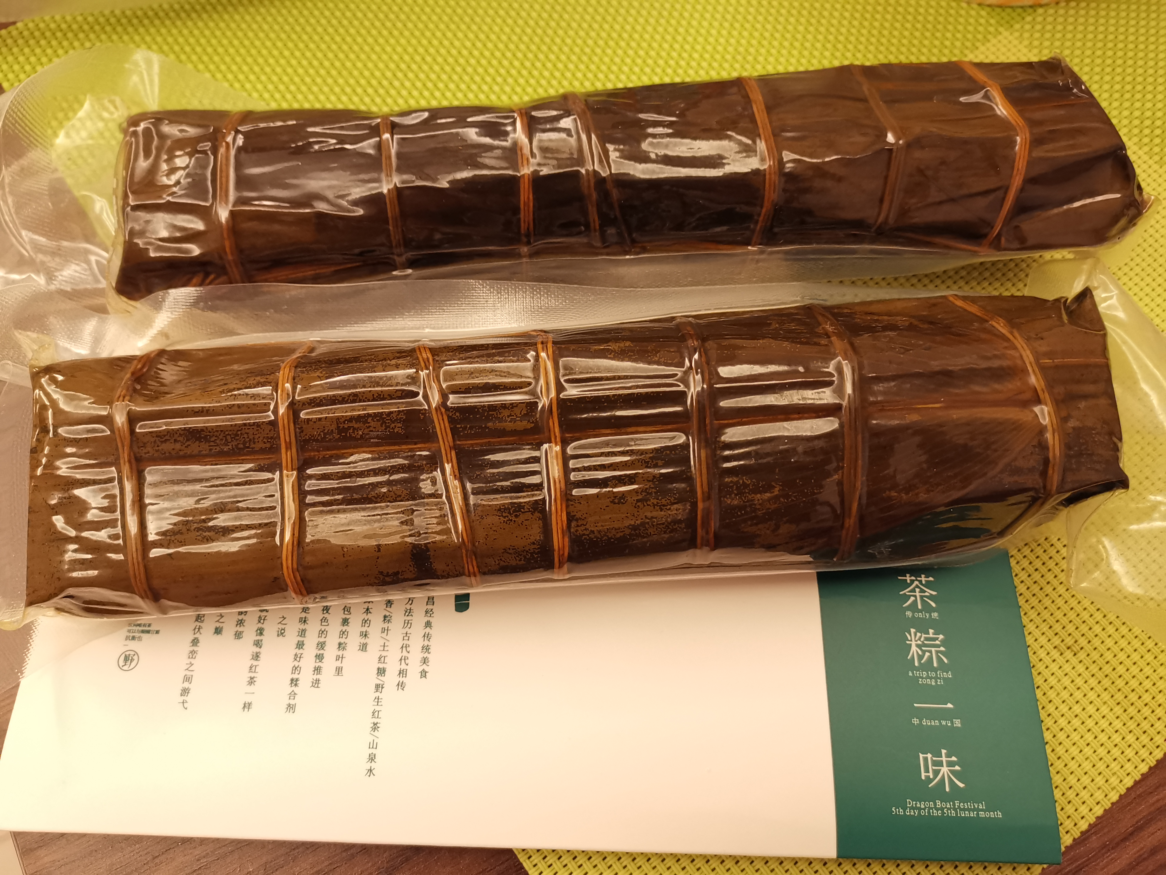 浙江丽水遂川长粽